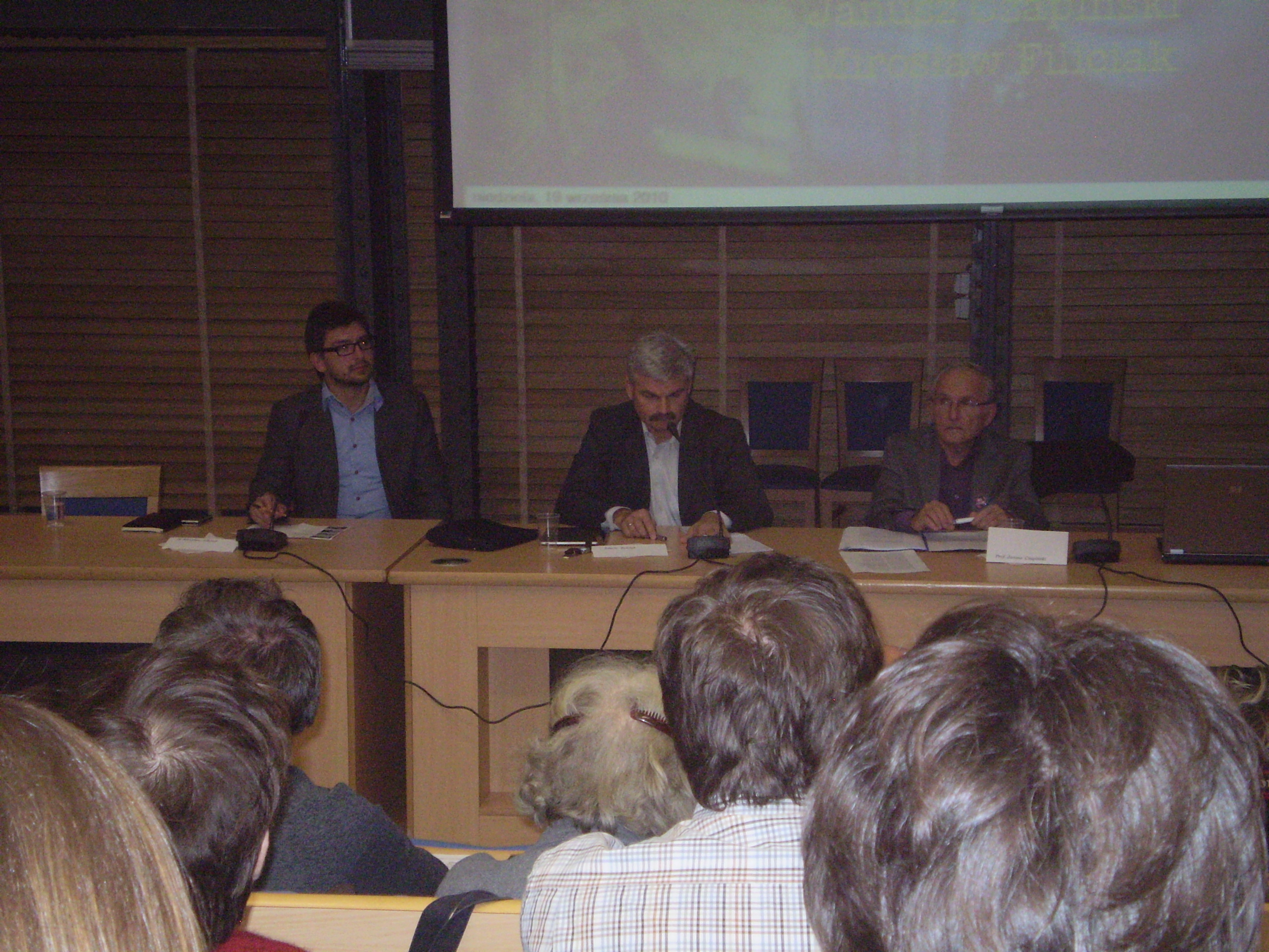 Red. Edwin Bendyk, Prof. dr hab. Janusz Czapiński, Dr Mirosław Filiciak podczas debaty „Dzieci Sieci” zorganizowanej w Starym BUW, Uniwersytetu Warszawskiego